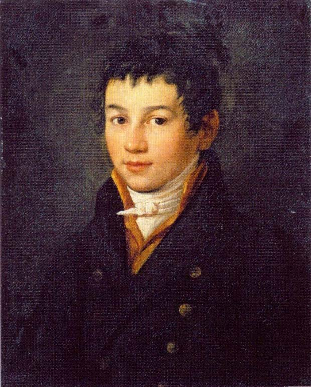 Автопортрет в юношеском возрасте